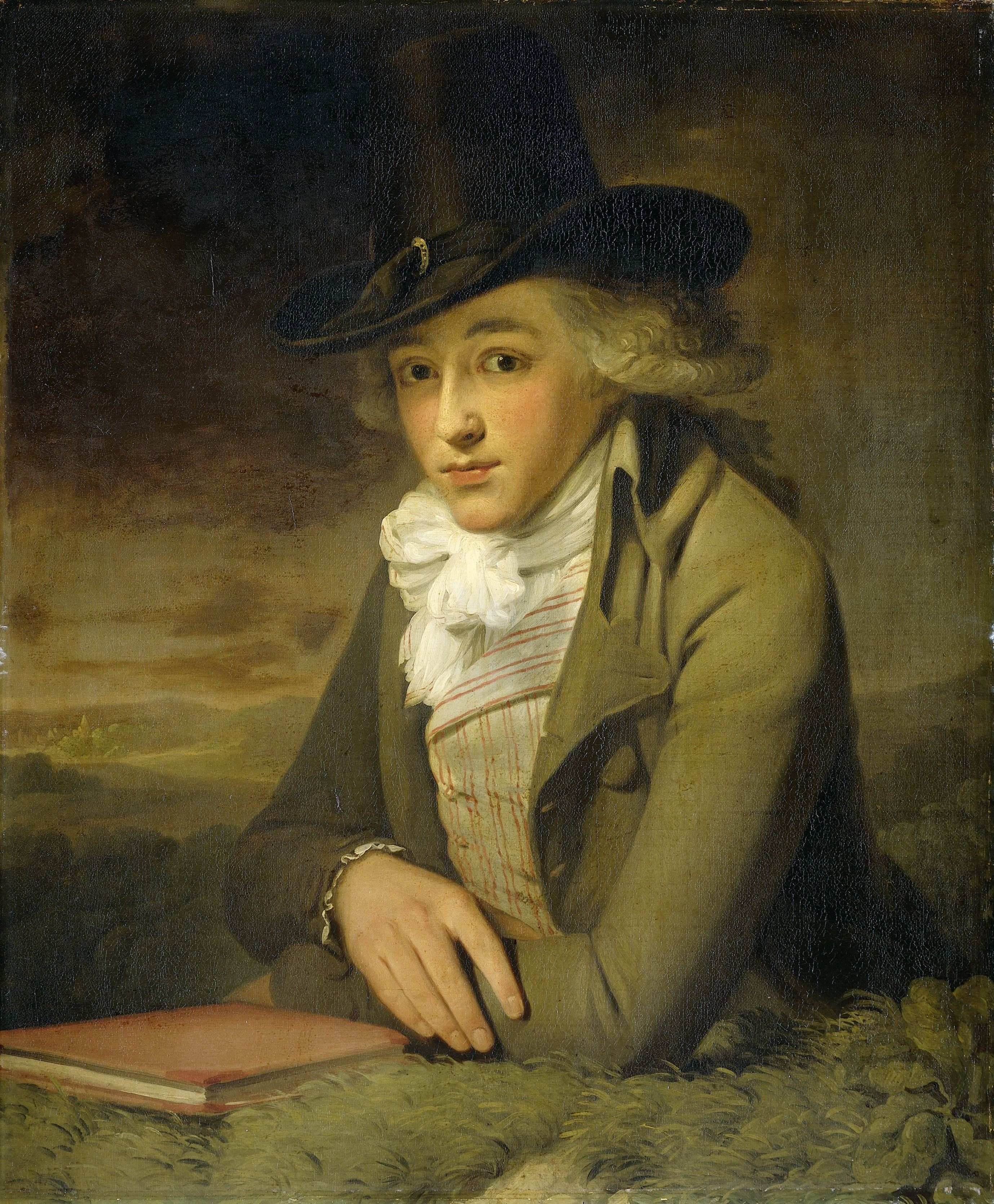 Portret van Jacob de Vos Willemsz. (1774-1844) in een landschap. De man is ten halven lijve weergegeven, leunend op een met gras begroeid heuveltje waarop, vlak voor zijn armen een boek ligt. Hij draagt een jas, gestreept vest, een witte shawl en een hoge zwarte hoed.